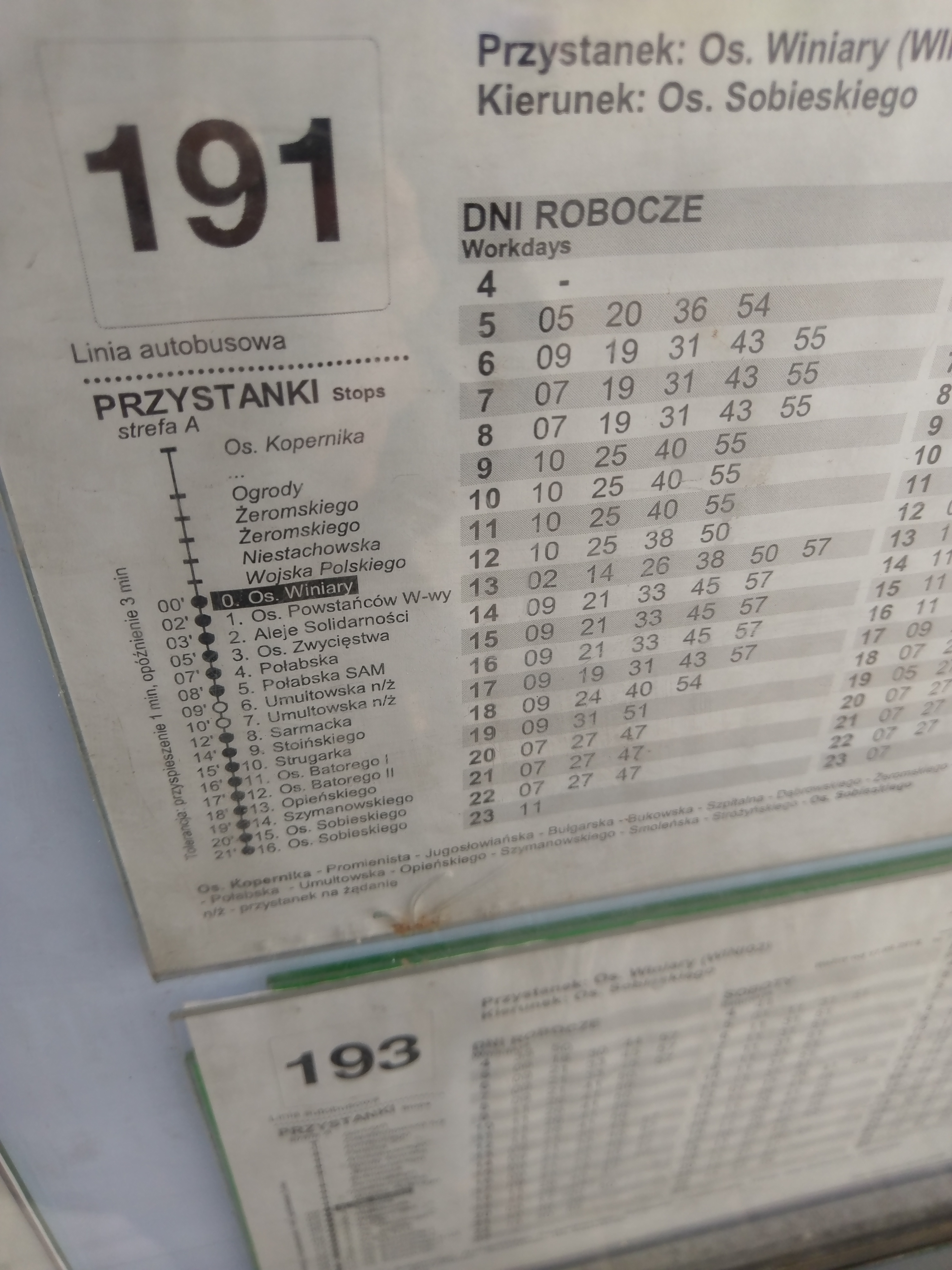 Rozkład jazdy autobusów MPK Poznań, po reformie numeracji